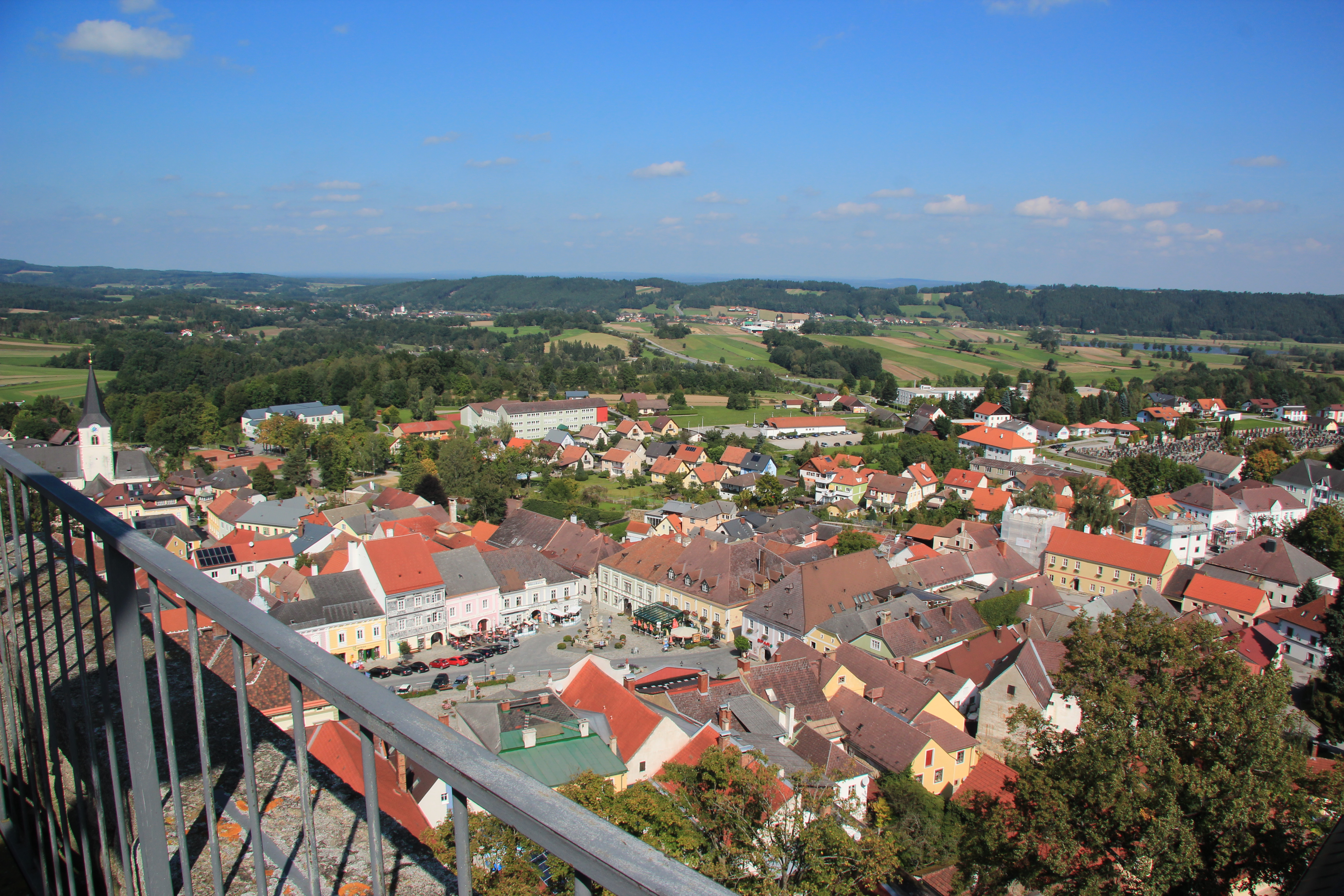 Blick auf die Stadt Weitra vom Schlossturm; Schloss Weitra in Weitra, Waldviertel, Niederösterreich Schloss Weitra Rathausplatz 4 Rathausplatz 6 Rathausplatz 9 Pfarrkirche